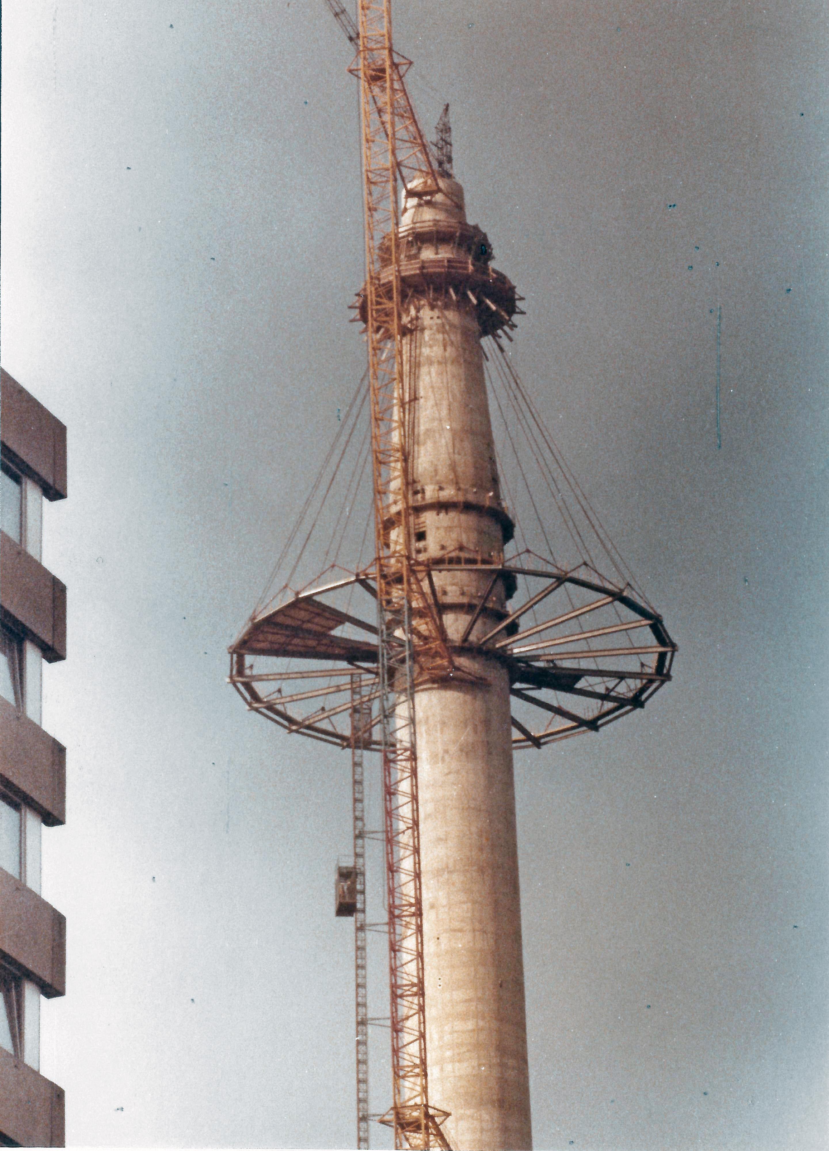 Die Kanzel wird begonnen